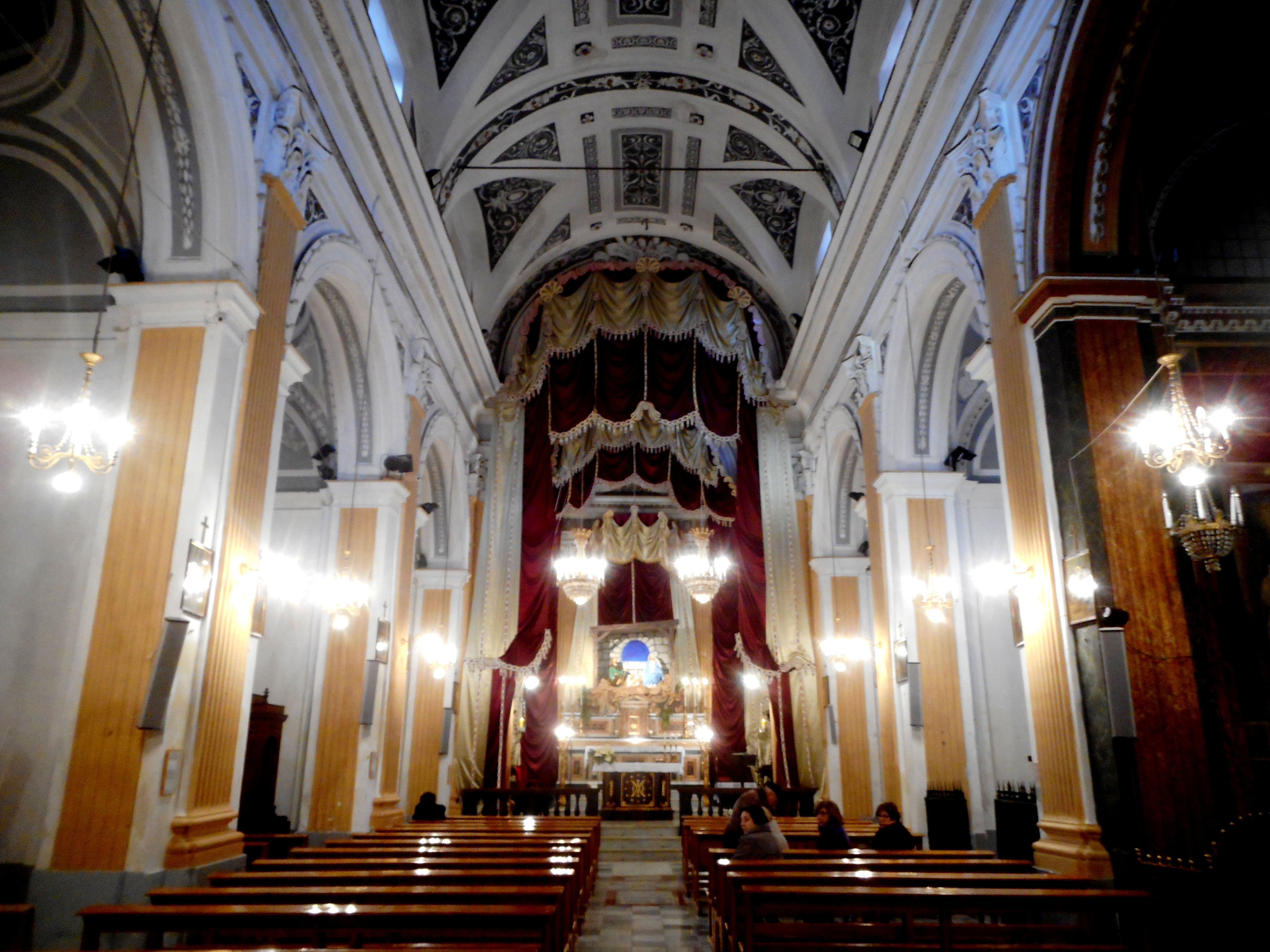 Interno della chiesa di San Francesco d'Assisi a Ciminna